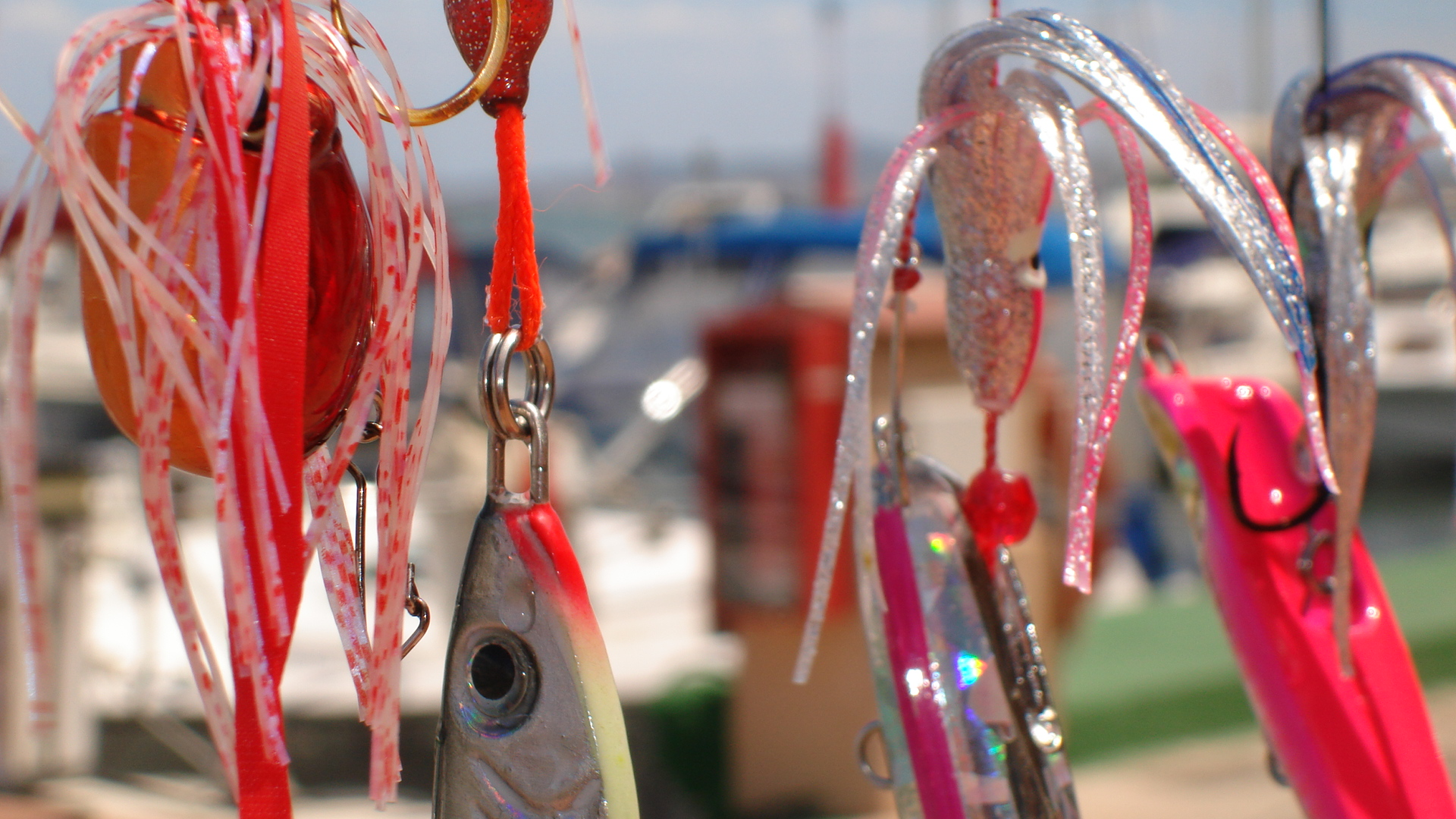 Algunos modelos de Jigs